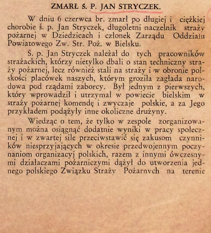 Wspomnienie pośmiertne o Janie Stryczku, naczelniku Ochotniczej Straży Pożarnej w Dziedzicach, teściu Stanisława Krzyżowskiego – cz. 1